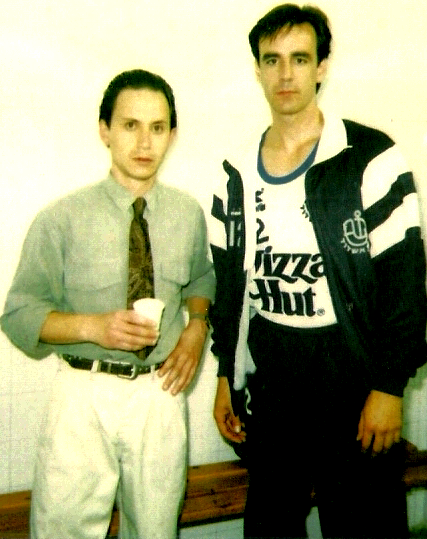 רפי אדיר